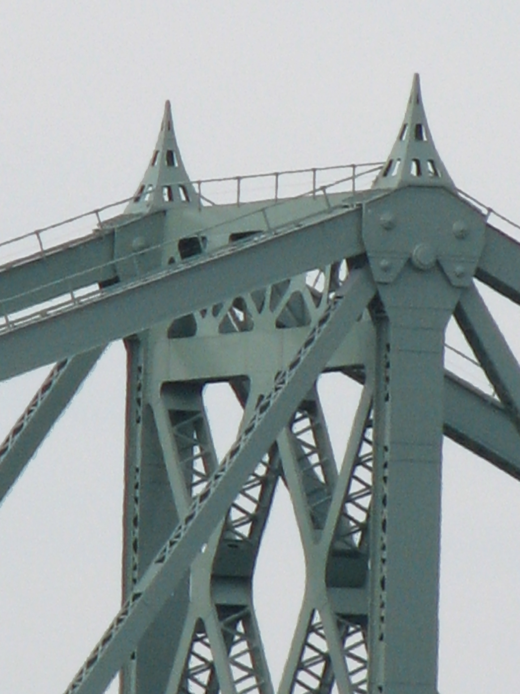 Pont Jacques-Cartier à Montréal (détail)